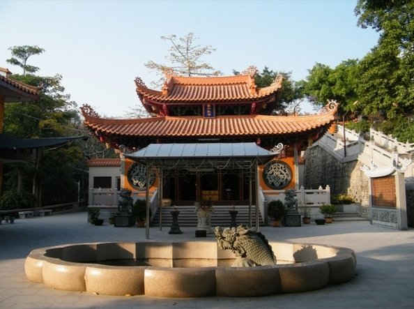 达濠三界庙孔庙